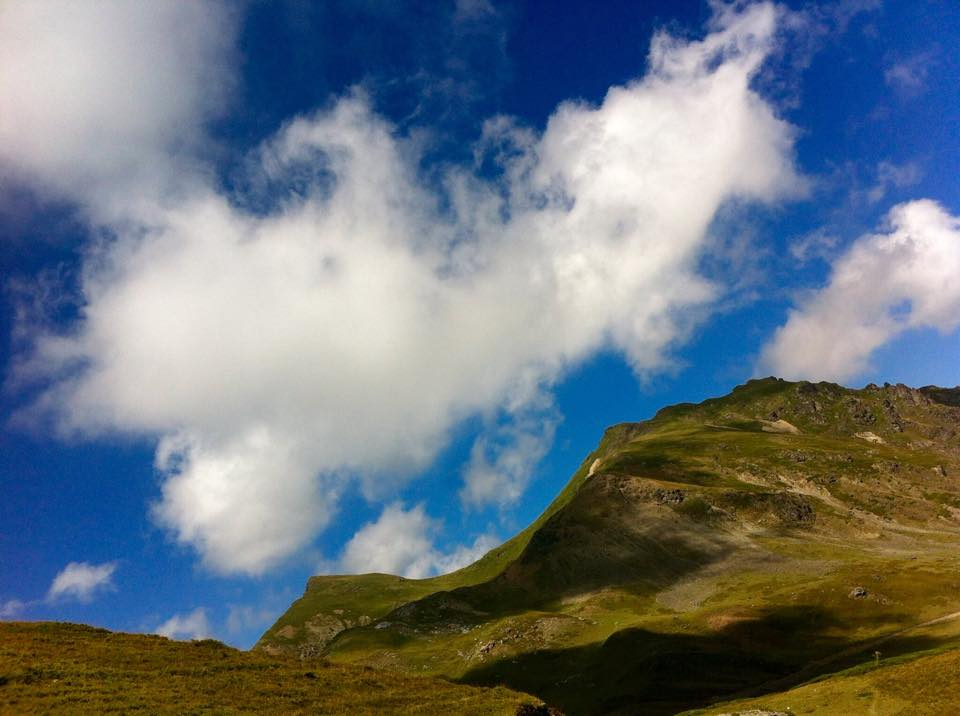 Aty ku natyra ka bërë mrekulli.Aty ku qënia humane vendosi ta pasuronte dhe me gjurmët e veta një hapsirë kaq mbresëlënëse sa kjo. Aty ku lodhja dhe stresi humbasin bindshëm në betejë. Pikërisht vendi që disponon vëmëndjen e miliona turistëve të cilët shprehin mrekullinë që nëna Natyrë iu ka falur këtyre viseve,aty ku TOKA PUTH QIELLIN ! Aty ku tradita na mësoi sesi ishte pika ideale e shumë luftëtarëve të cilët përzgjodhën jashtzakonisht me mençuri vendin ku ata mund të thurnin strategjitë e tyre të punës.Vend i bekuar ! Vend ku armët gjenin prehje në ata lisa të begatë, nga ku vjen tek ne mjaft natyrshëm zanafilla e emrit të këtij vendi. Dhe jo vetëm armët,por çdonjëri nga ne.